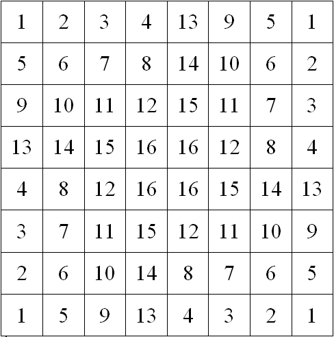 Cardan Grille Constuctor